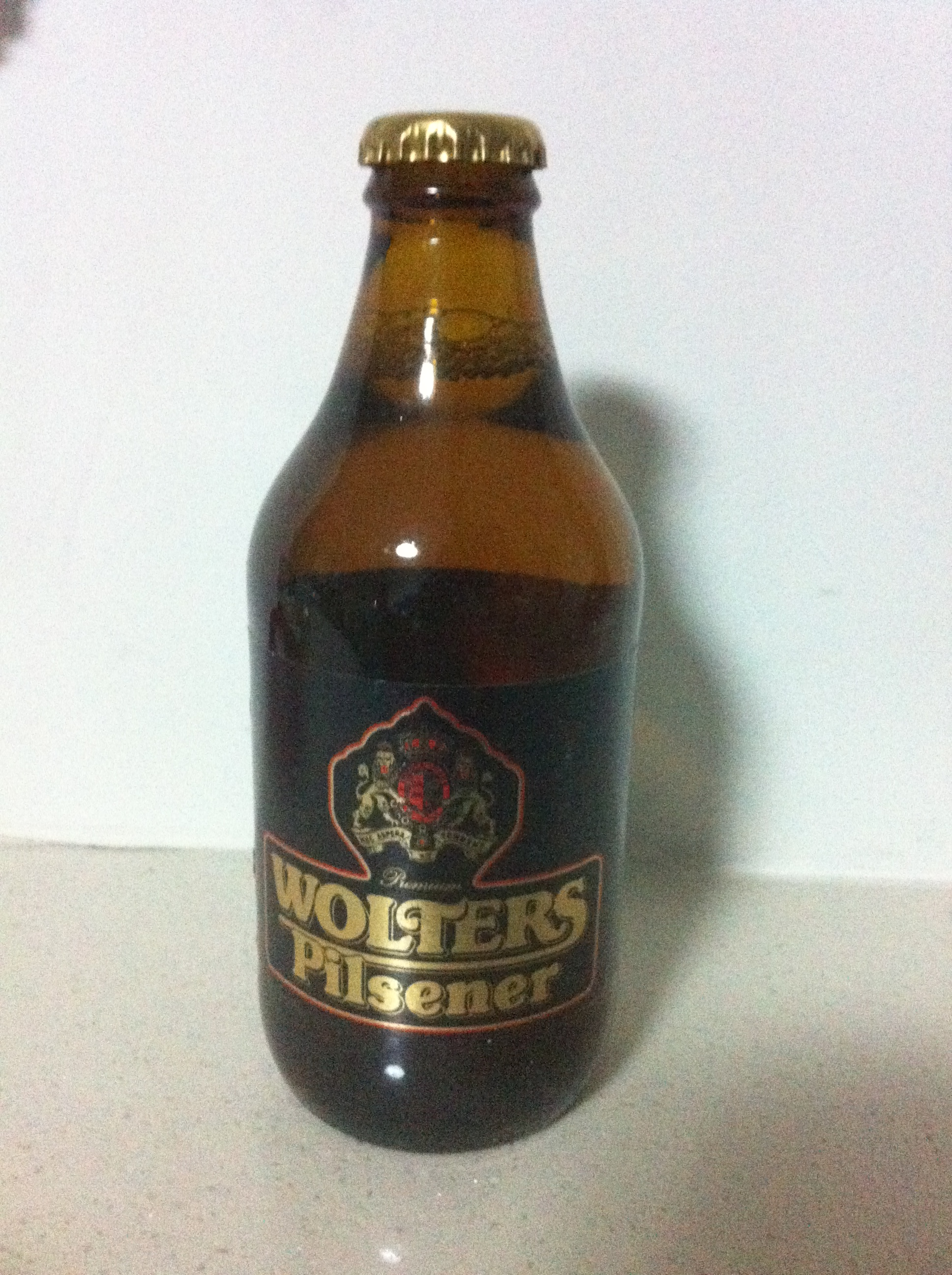 bouteille de bière Wolters